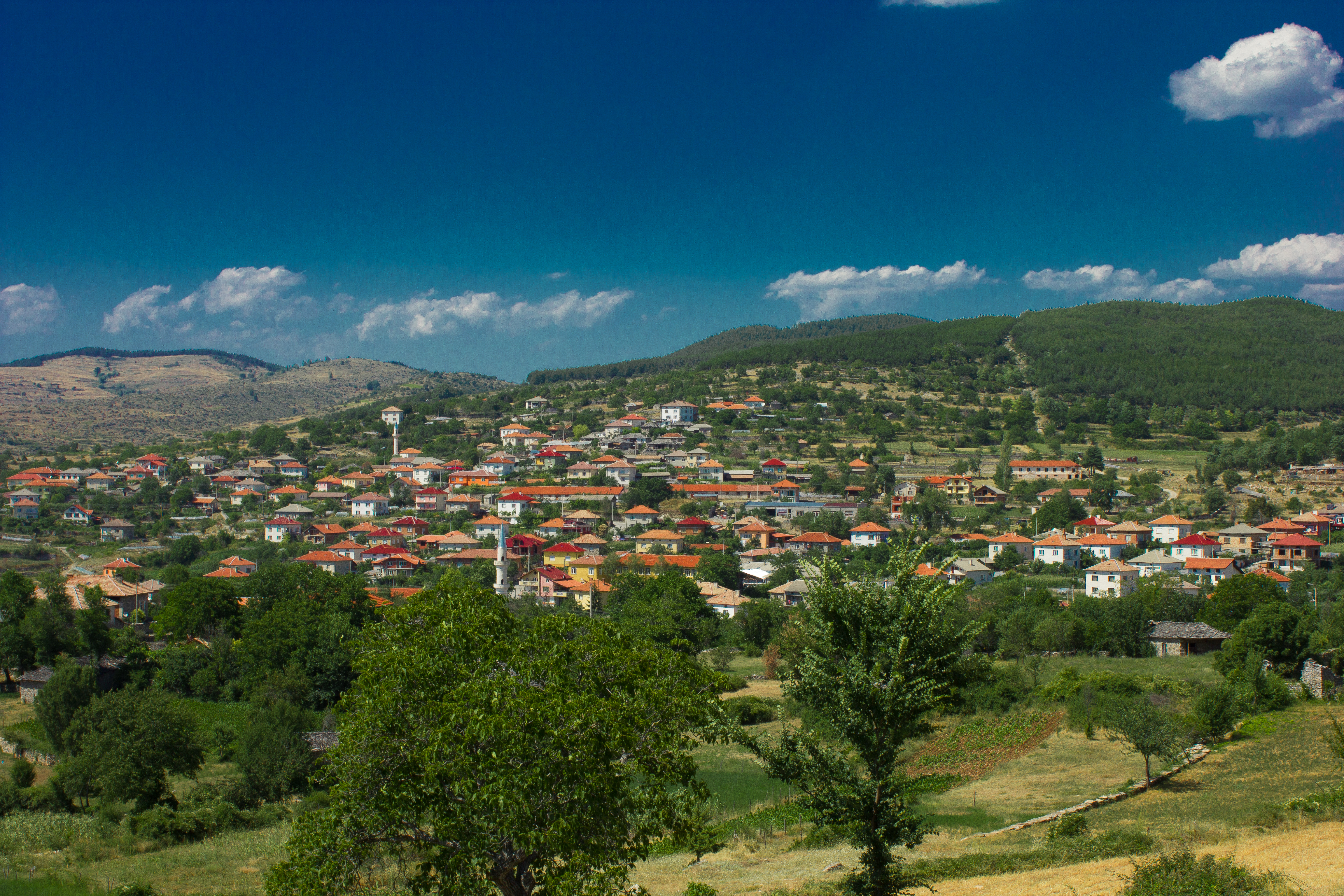 Поглед към село Туховища през 2012 г.